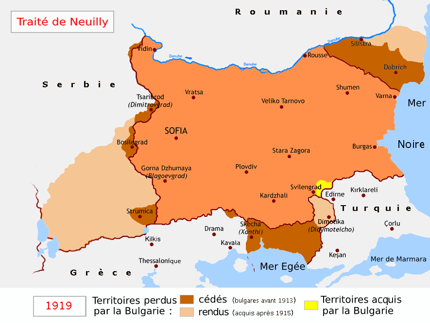 Bulgarie après le Traité de Neuilly sur Seine (27 novembre 1919)